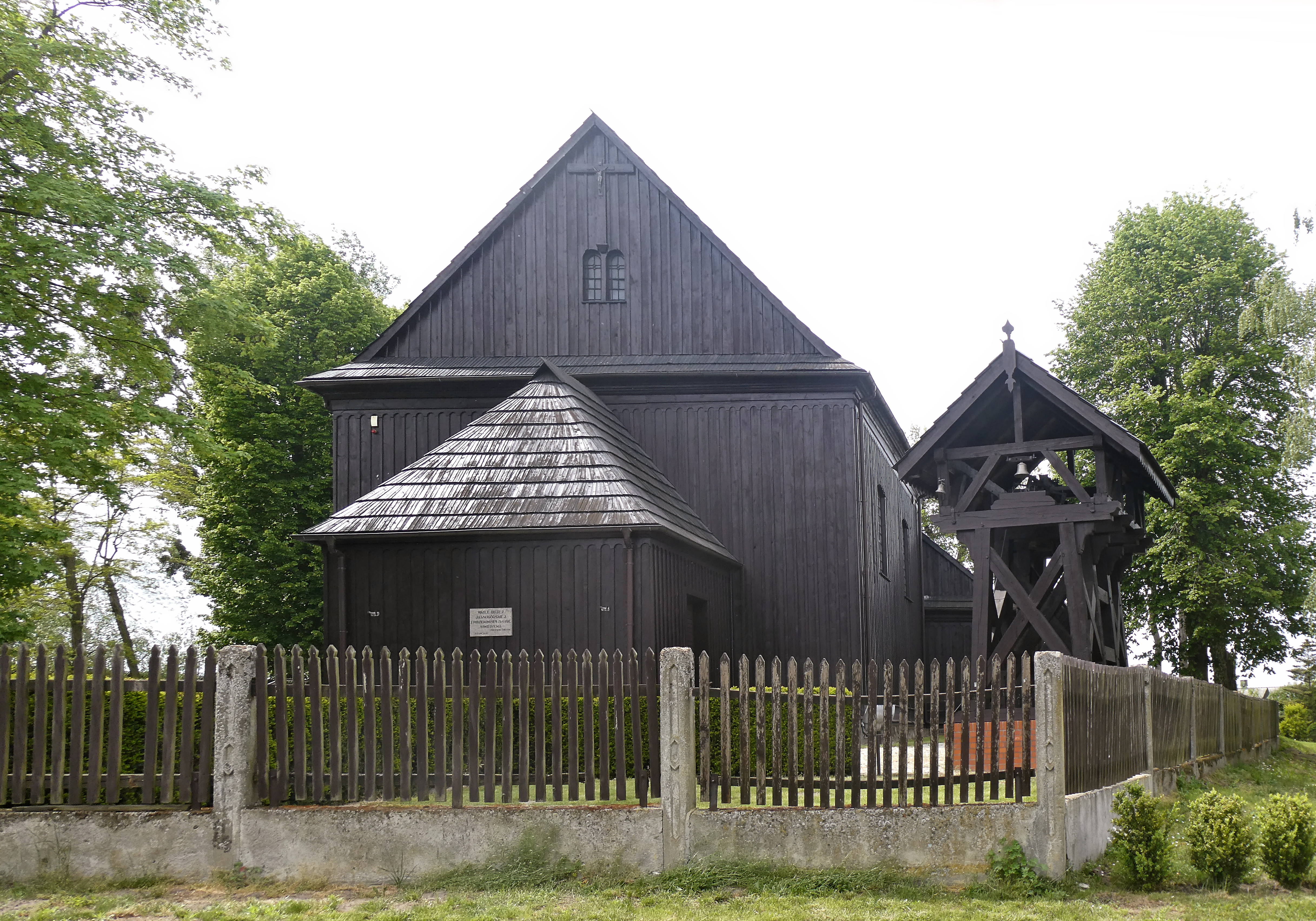 Śnieciska, kościół parafialny)